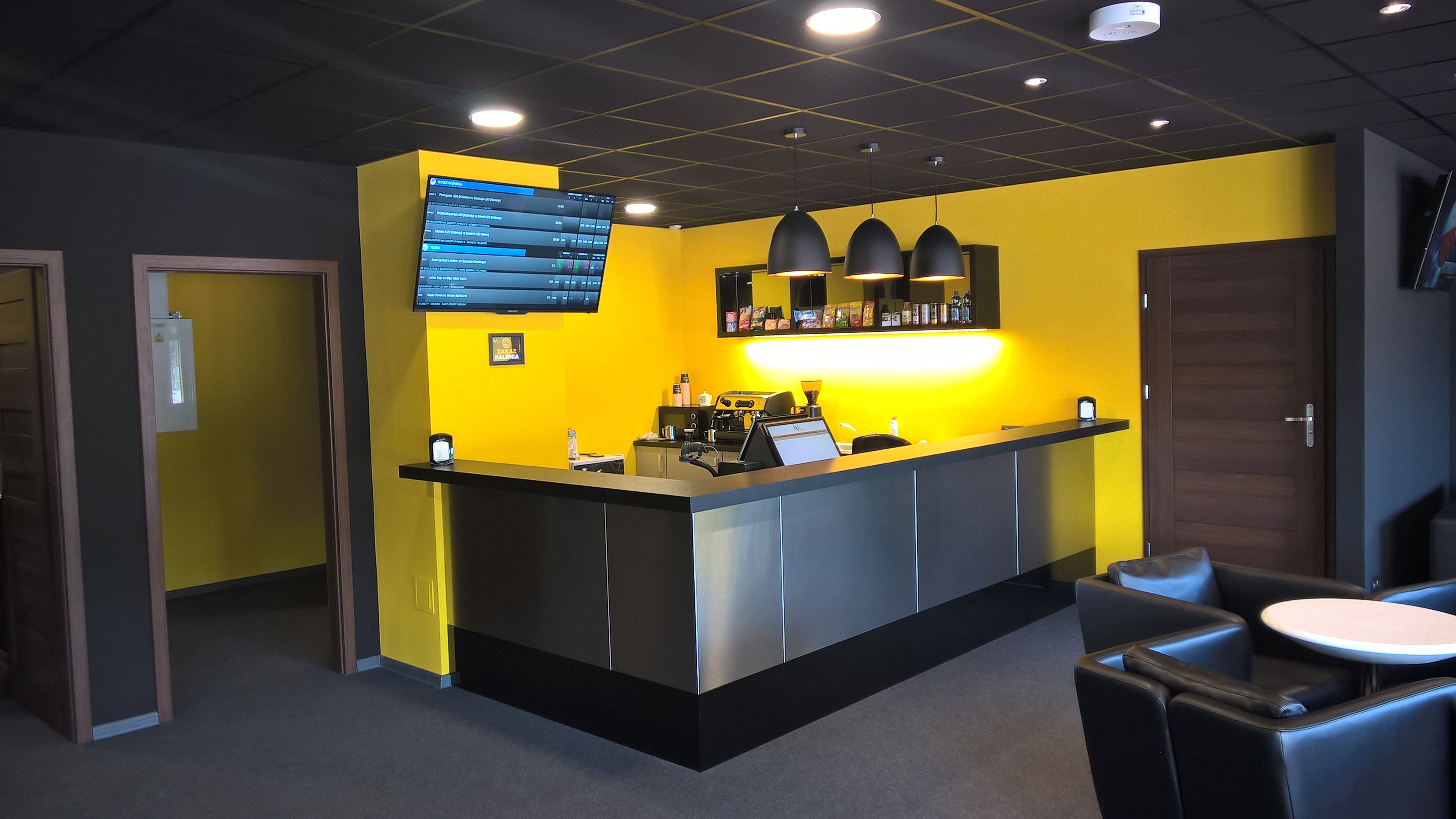 Nowy stadion Widzewa – lokal LVBet Sport Bar pod trybuną "D" (lipiec 2017)